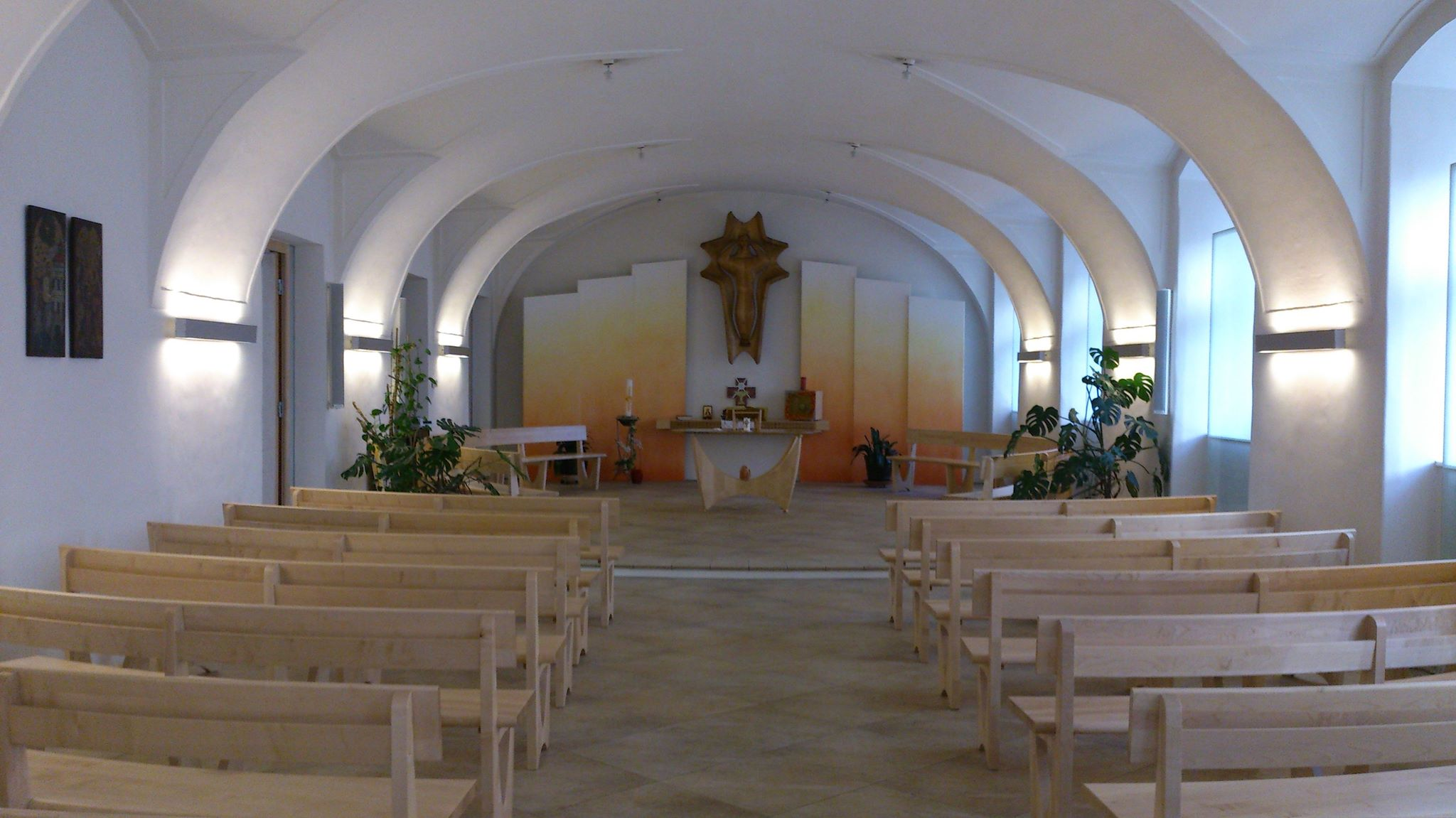 Kirchenraum der Altkatholischen Auferstehungskirche Graz